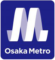 大阪市高速電気軌道（Osaka Metro）のロゴ